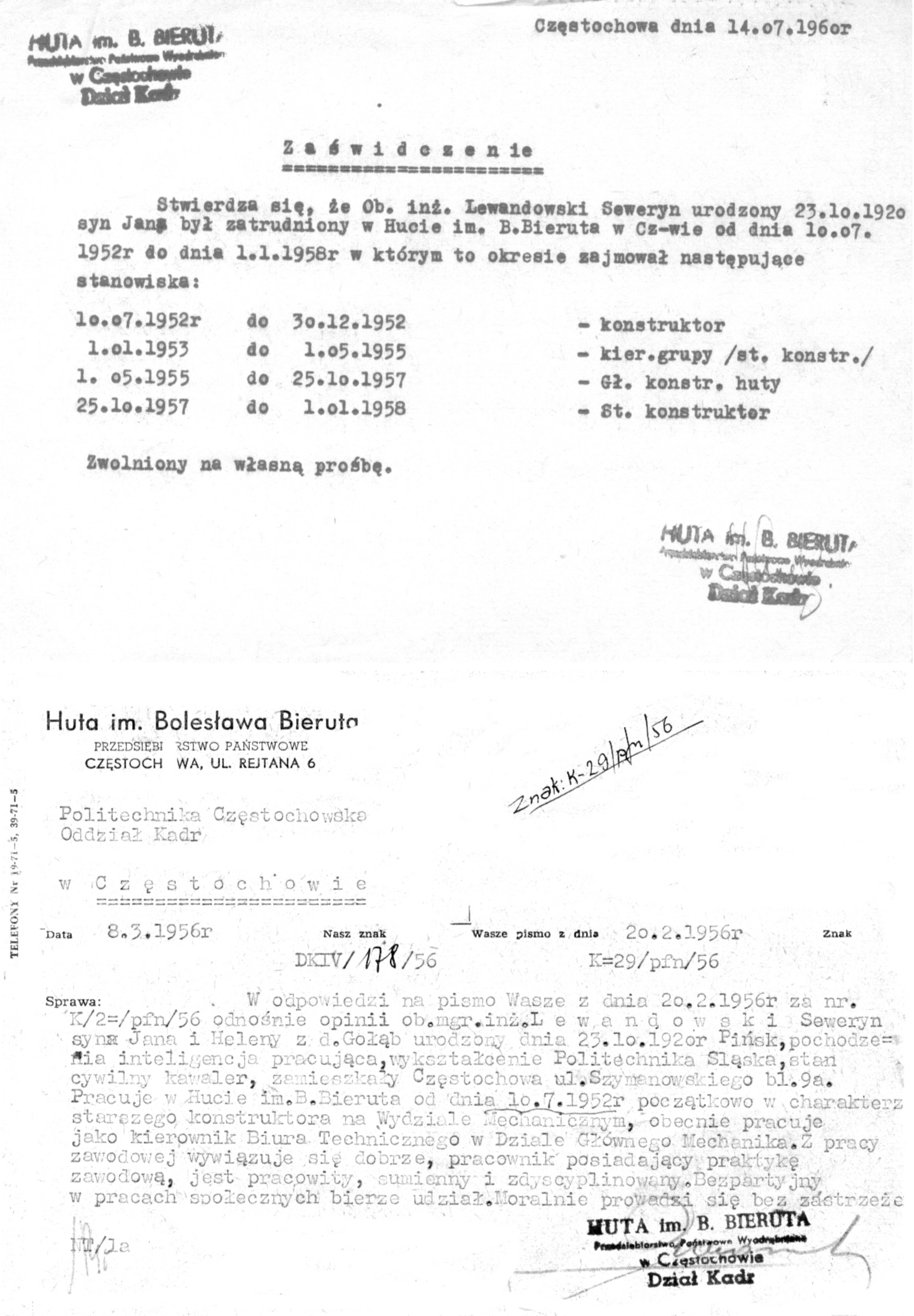 Poświadczenie zatrudnienia w Hucie im. B. Bieruta